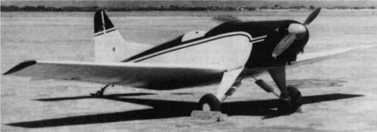 岡村製作所（旧日本飛行機岡村工場） N-52（軽飛行機）。初飛行は昭和28年4月7日、浜松飛行場。